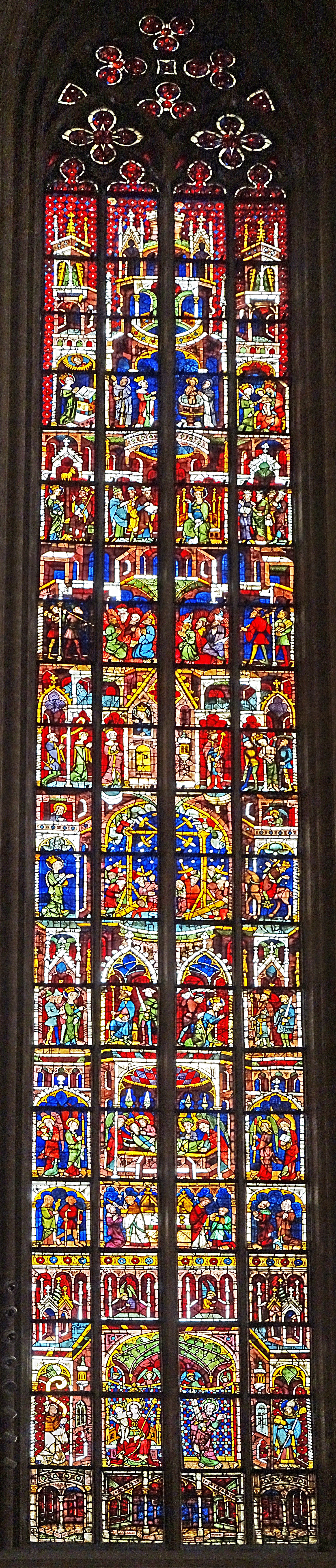 Katharinenfenster (nV) im Hohen Chor des Erfurter Doms St. Marien